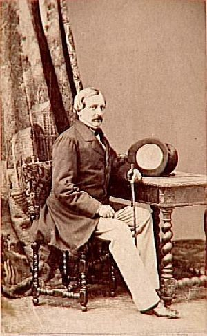 Eugène Chevandier de Valdrome, photographie officielle du ministre du Second Empire en 1869.